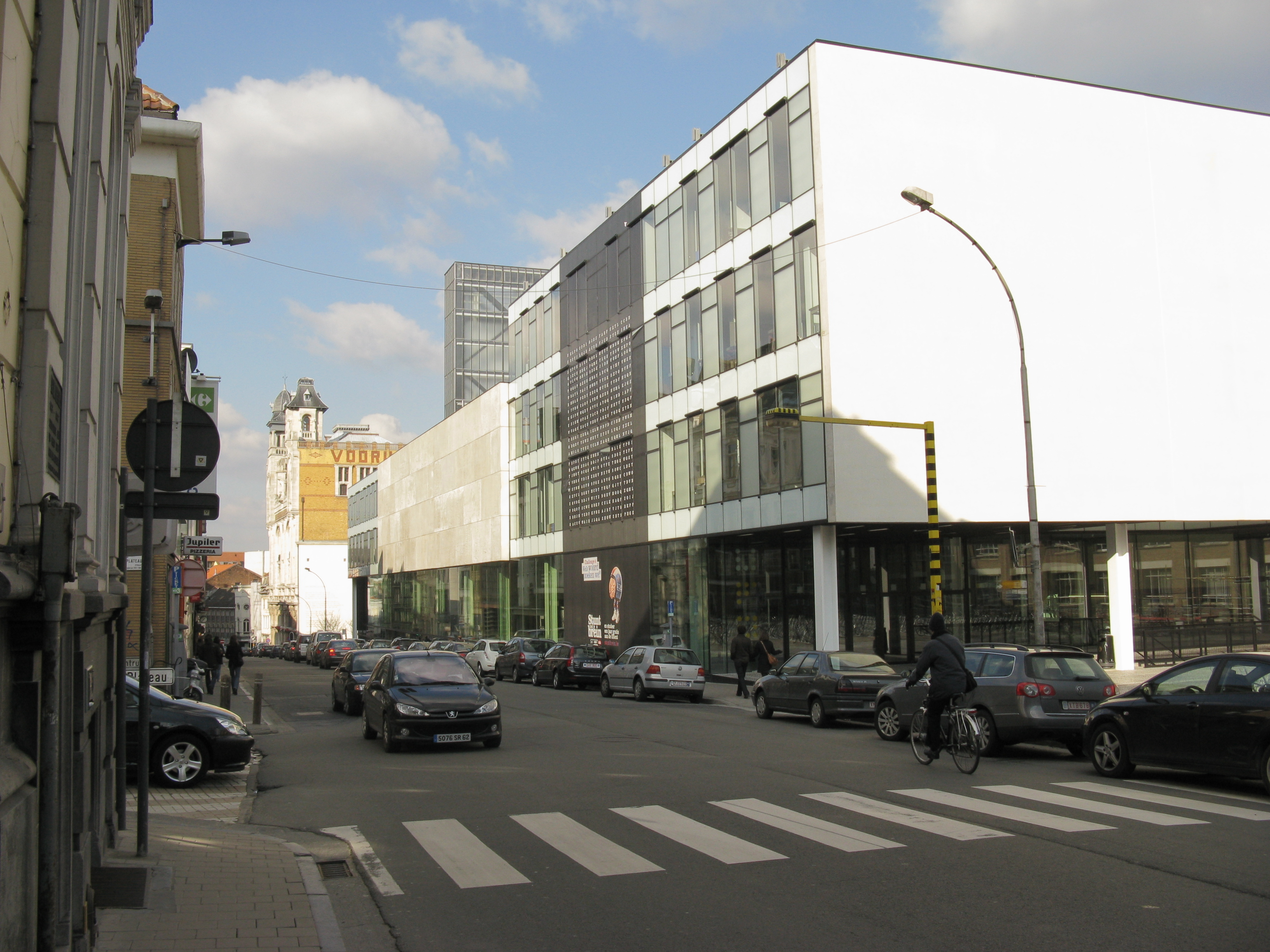 Nieuw universiteitsgebouw aan de Sint-Pietersnieuwstraat in Gent, met op de achtergrond de Vooruit.